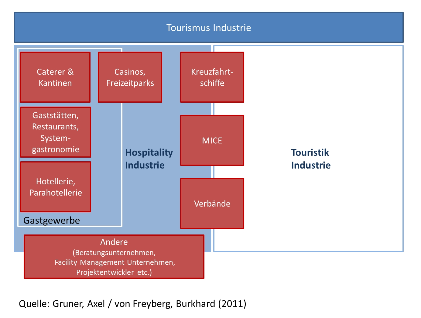 Veranschaulichung der Tourismus Industrie mit den Bereichen Gastgewerbe, Hospitality Industrie und Touristik Industrie